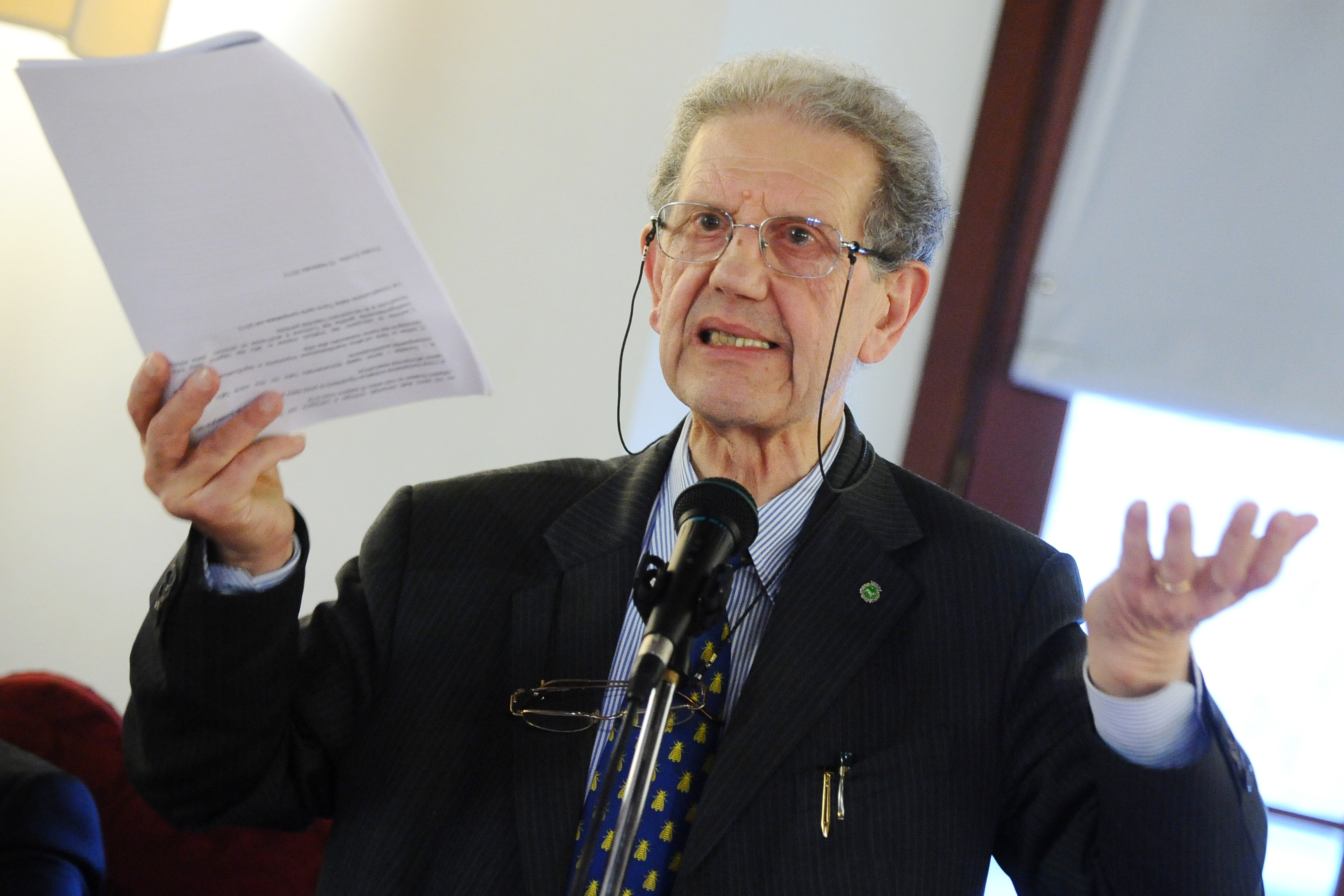 Salvatore Settis a Trento nella Sala Falconetto di Palazzo Geremia.